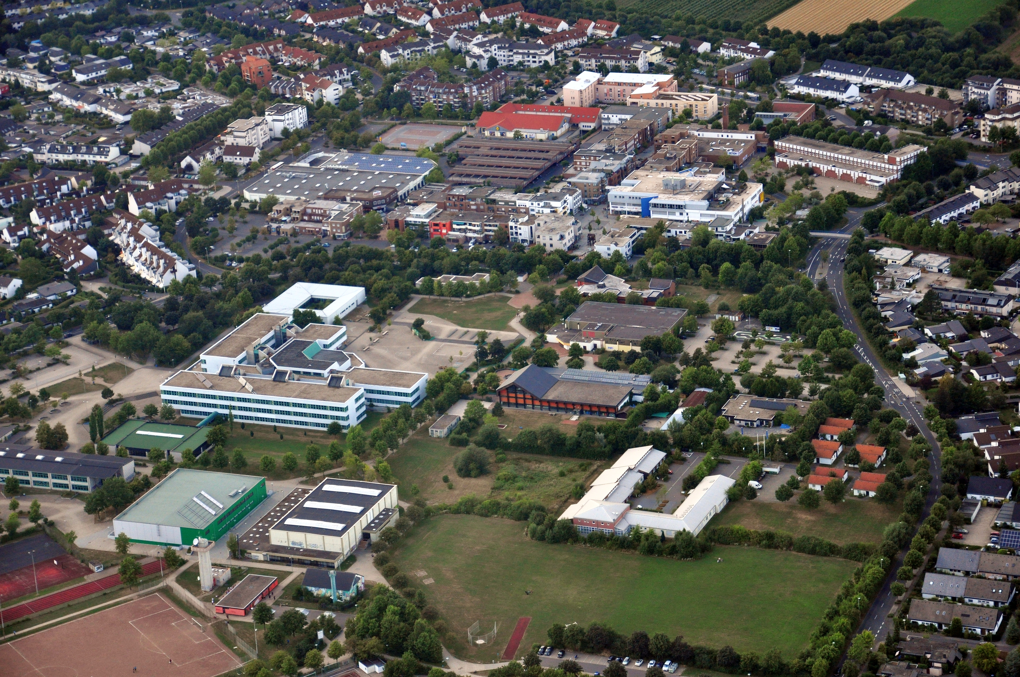 Meckenheim — Neue Mitte und Schulcampus 2013, Flughöhe ca. 500m, Blick aus südöstlicher Richtung